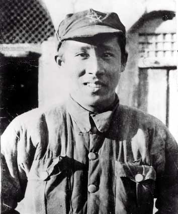 身穿戎装的廖承志